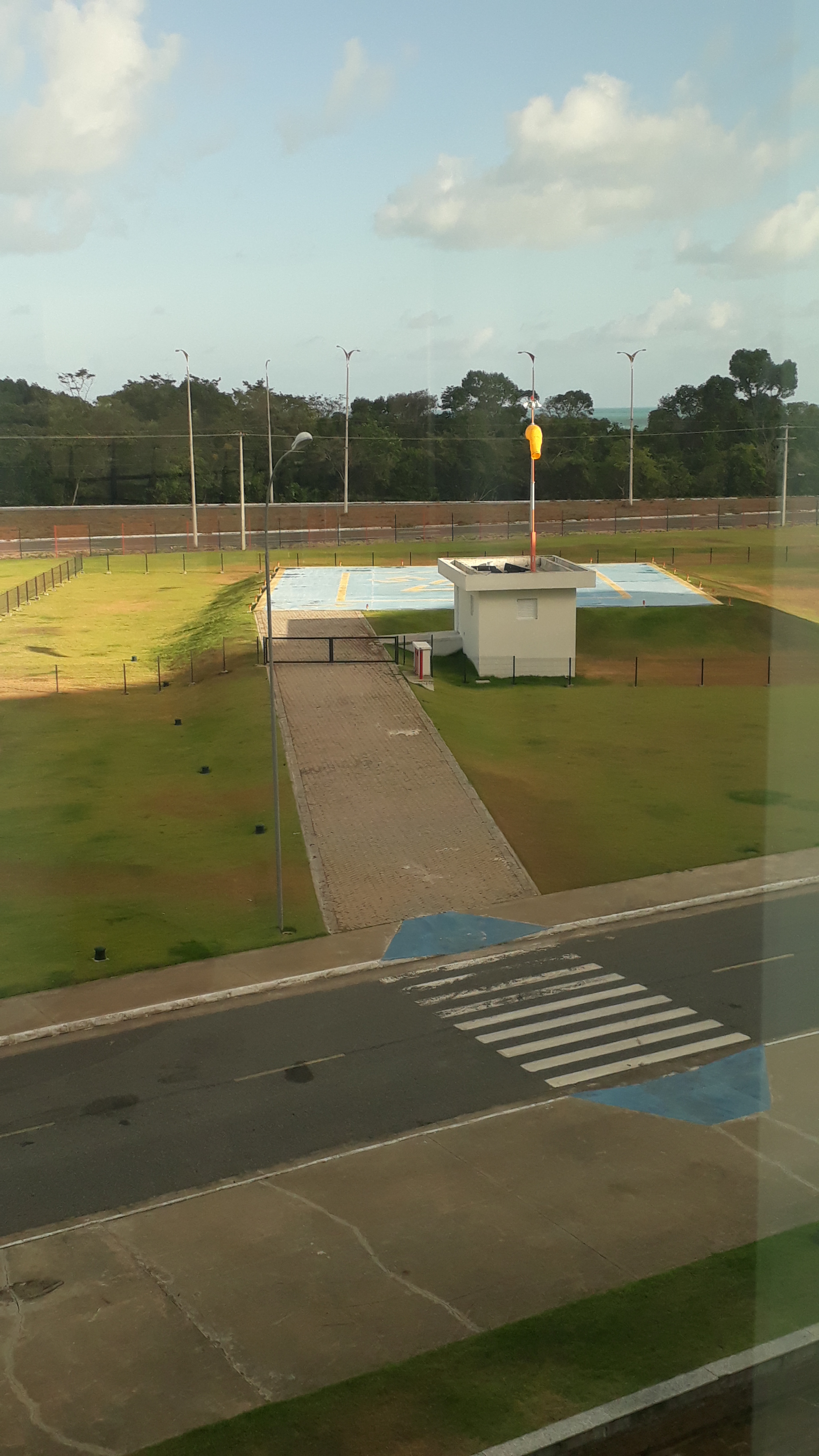 Pista de Pouso do Centro de Convenções Poeta Ronaldo Cunha Lima, João Pessoa, Paraíba